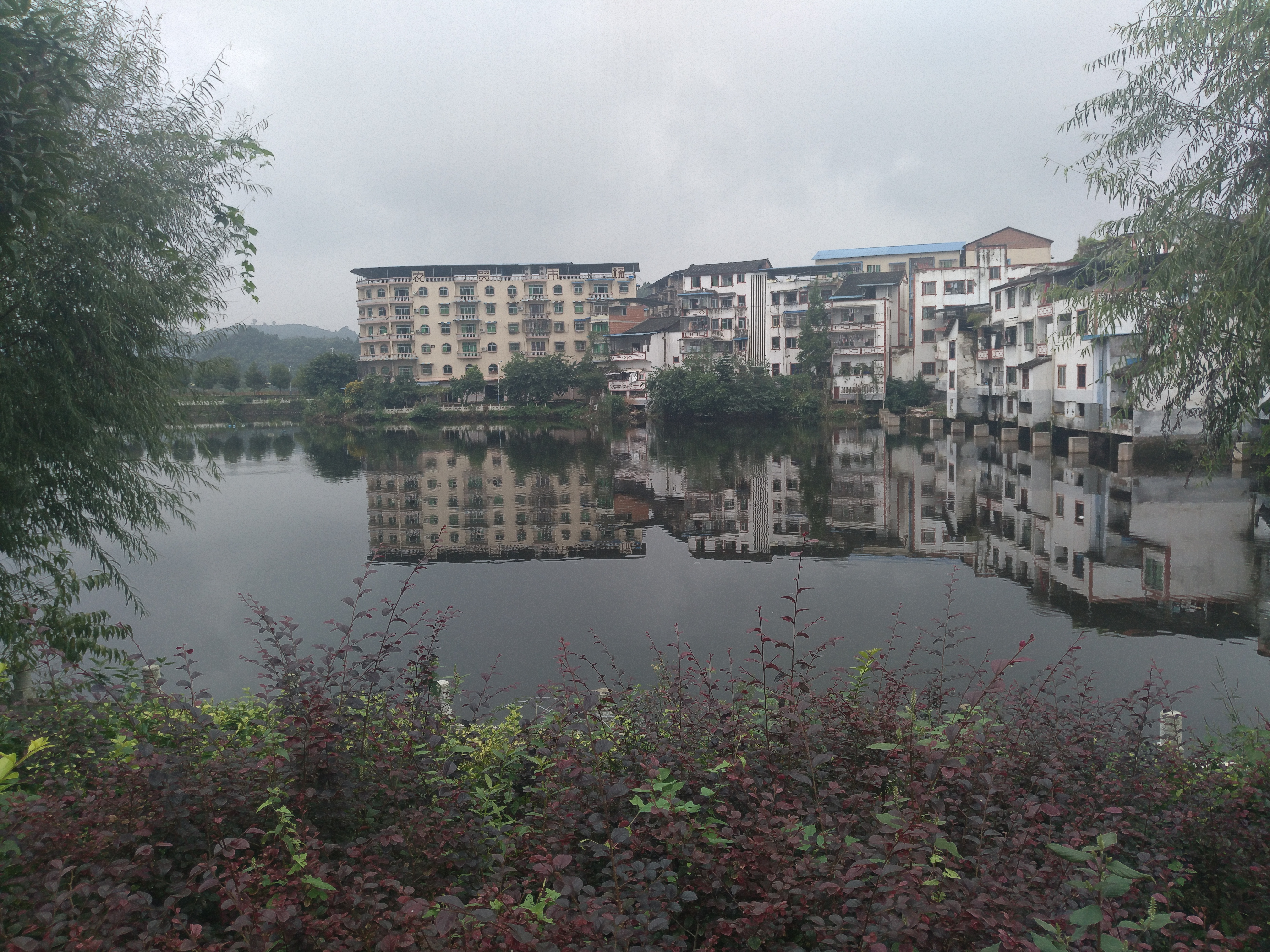 中国重庆市垫江县三溪镇